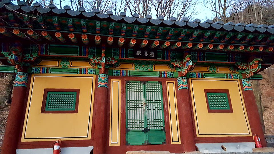 영주 부석사 응진전